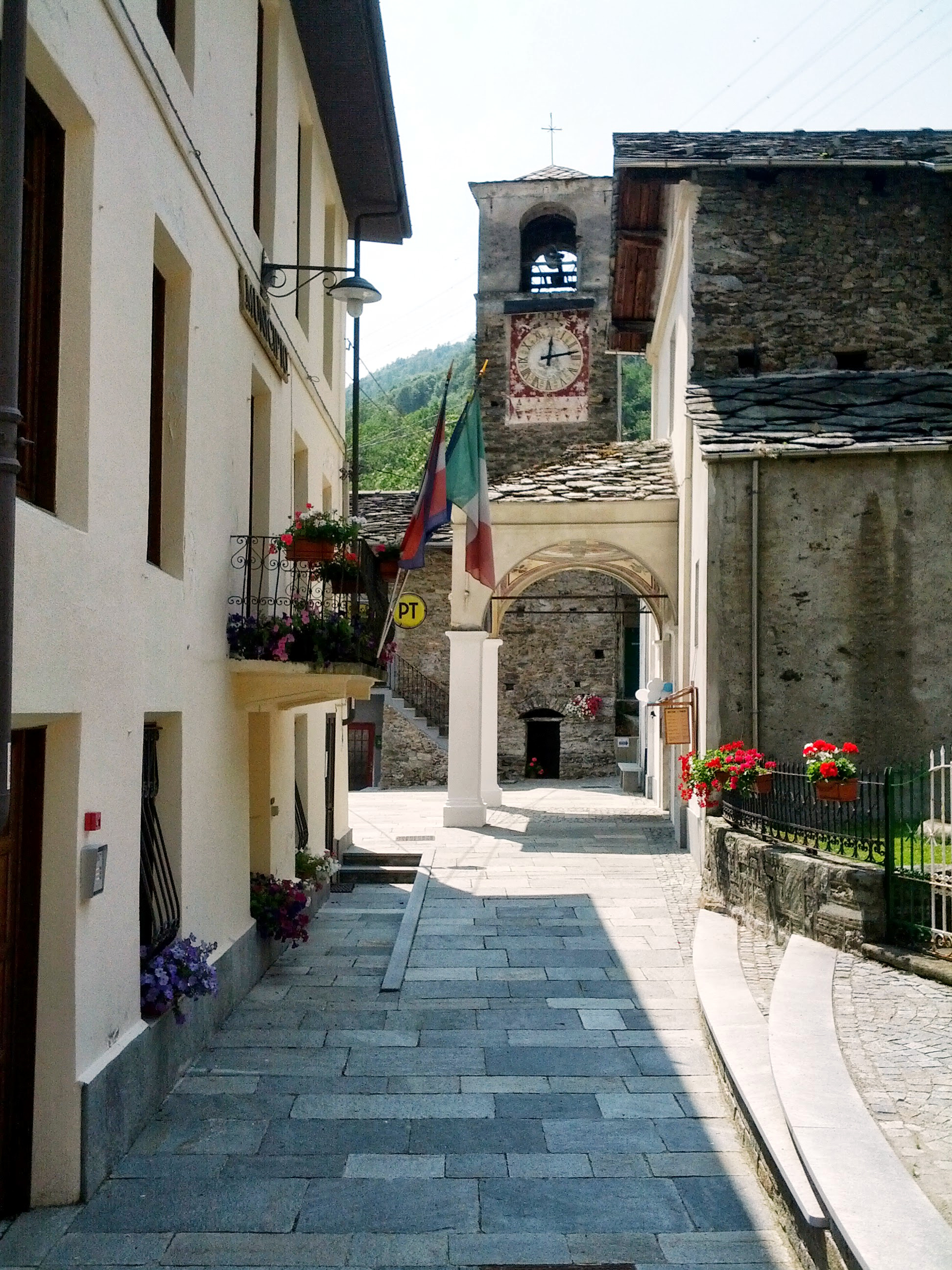 Veduta del municipio e della piazza di Ingria (TO).